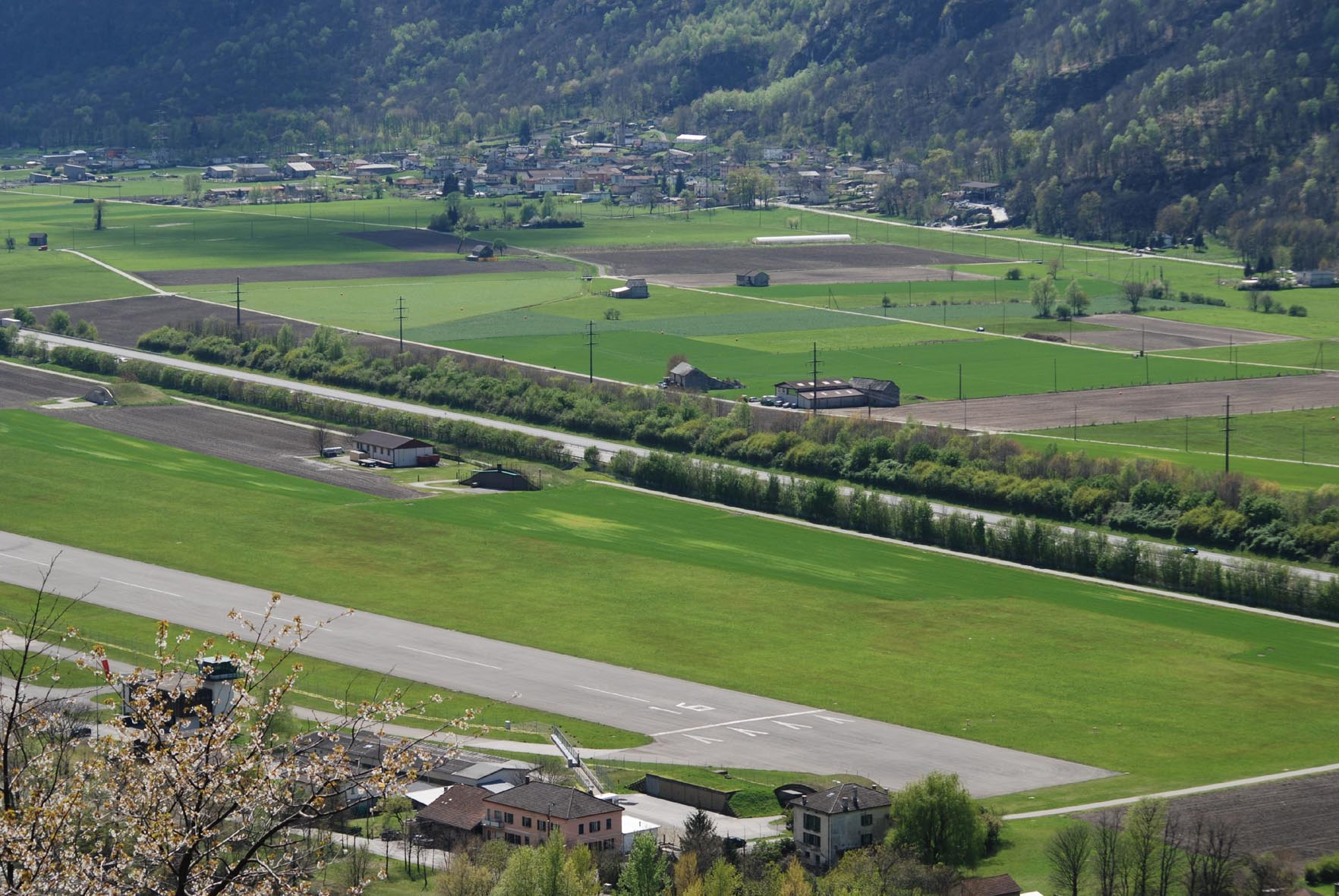 Data 19 aprile 2008